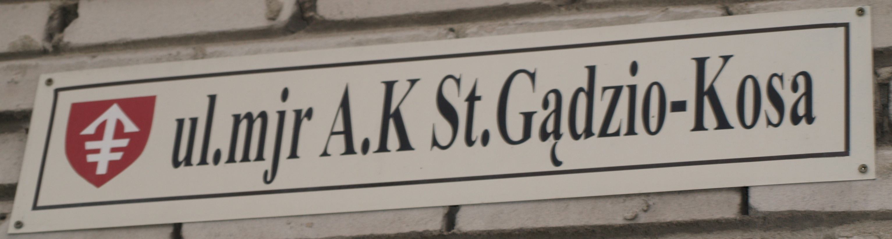 Ulica_Stefana_Gądzio-Kosa, Jędrzejów, Poland